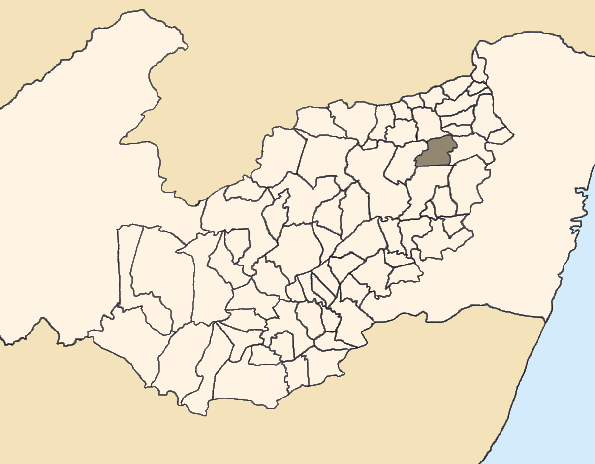 Mapa da mesorregião Agreste de Pernambuco (Brasil) subdivida em municípios. Em destaque, o município de Cumaru. Map of the brazilian state of Pernambuco (mesorregião Agreste) showing the city of Cumaru. Imagem tratada com o GIMP. Image made with GIMP.